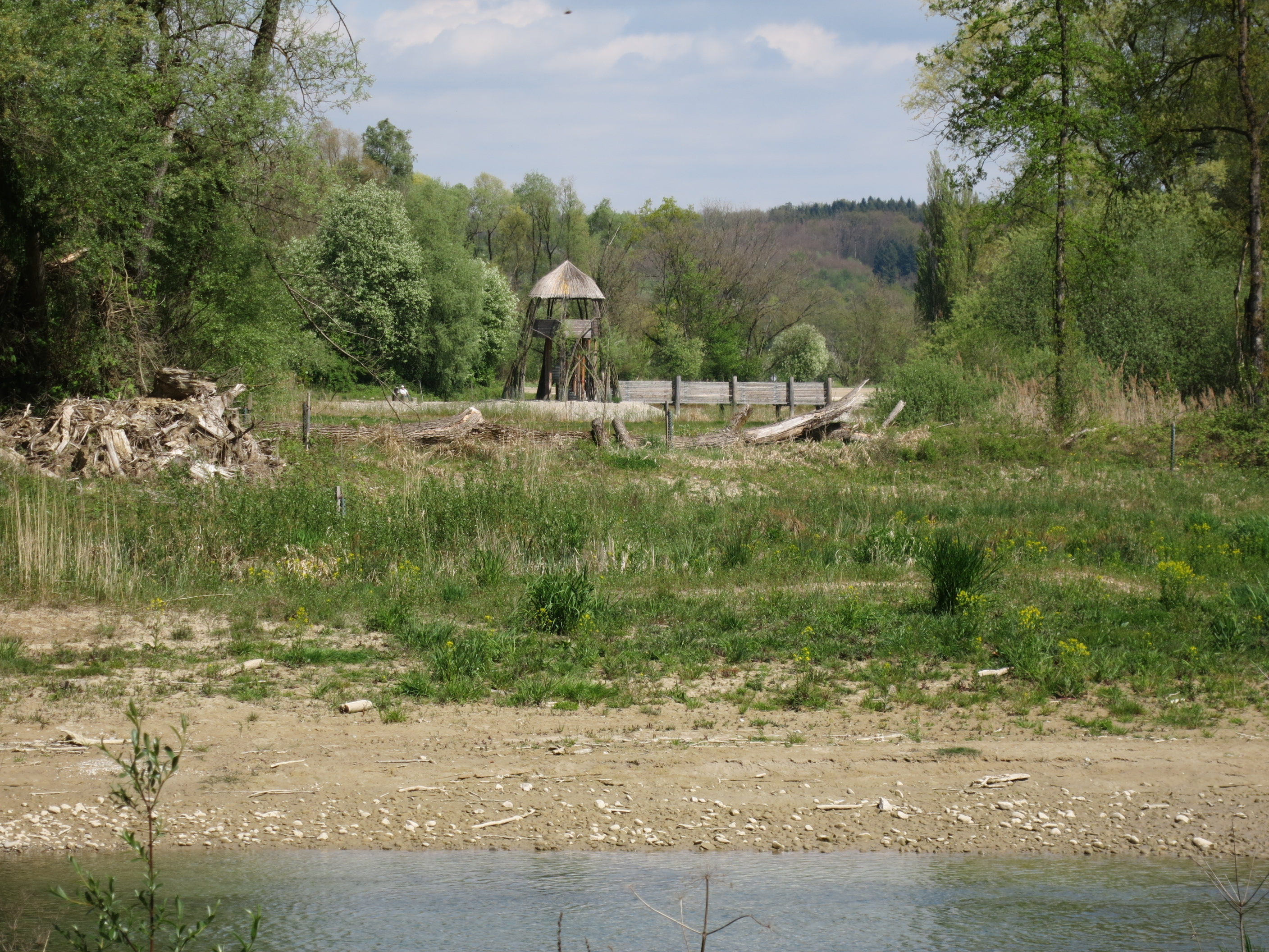 Chly Rhy Auen, Rietheim AG, Schweiz